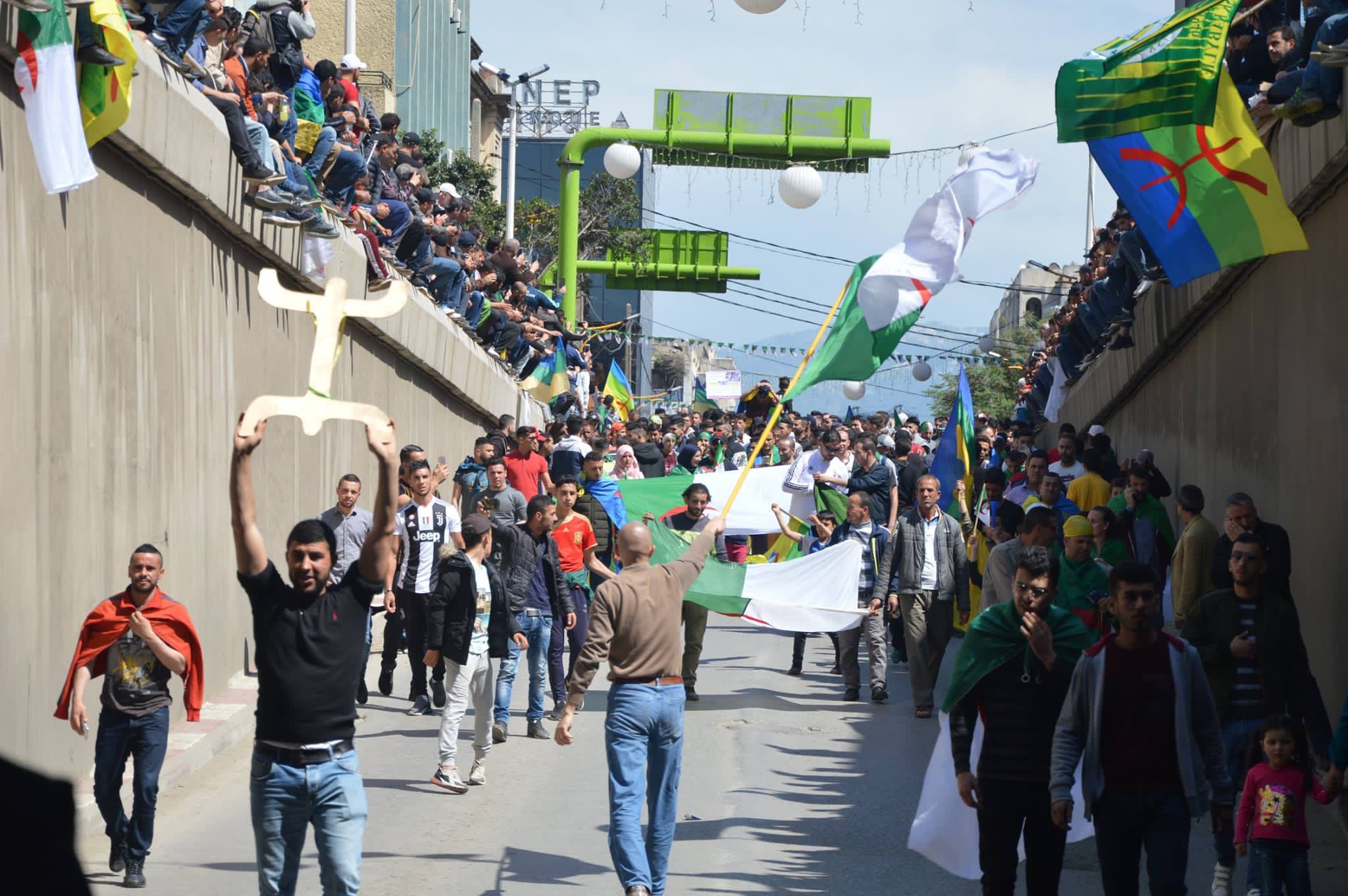 Marche populaire algérienne à la ville de tizi-Ouzou , non au racisme, nous sommes tous des algériens, kabyle et arabe sont des frères